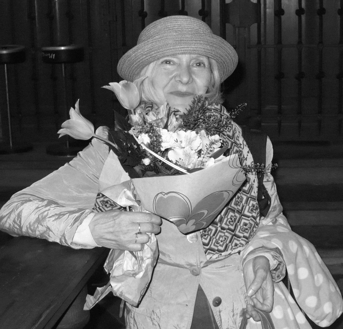 Věra Jirousová